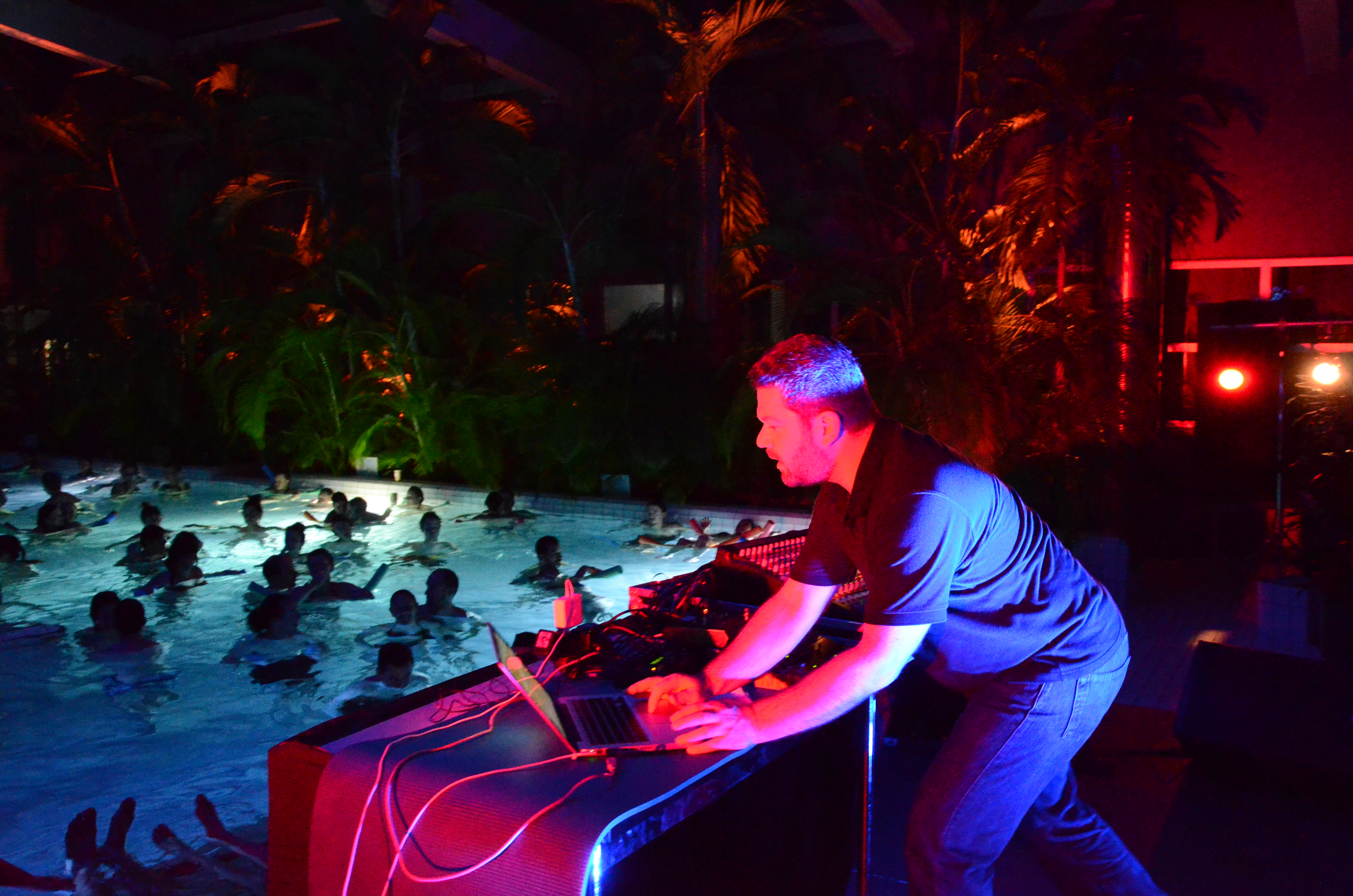 Pole alias Stefan Betke, producteur allemand de musique électronique.